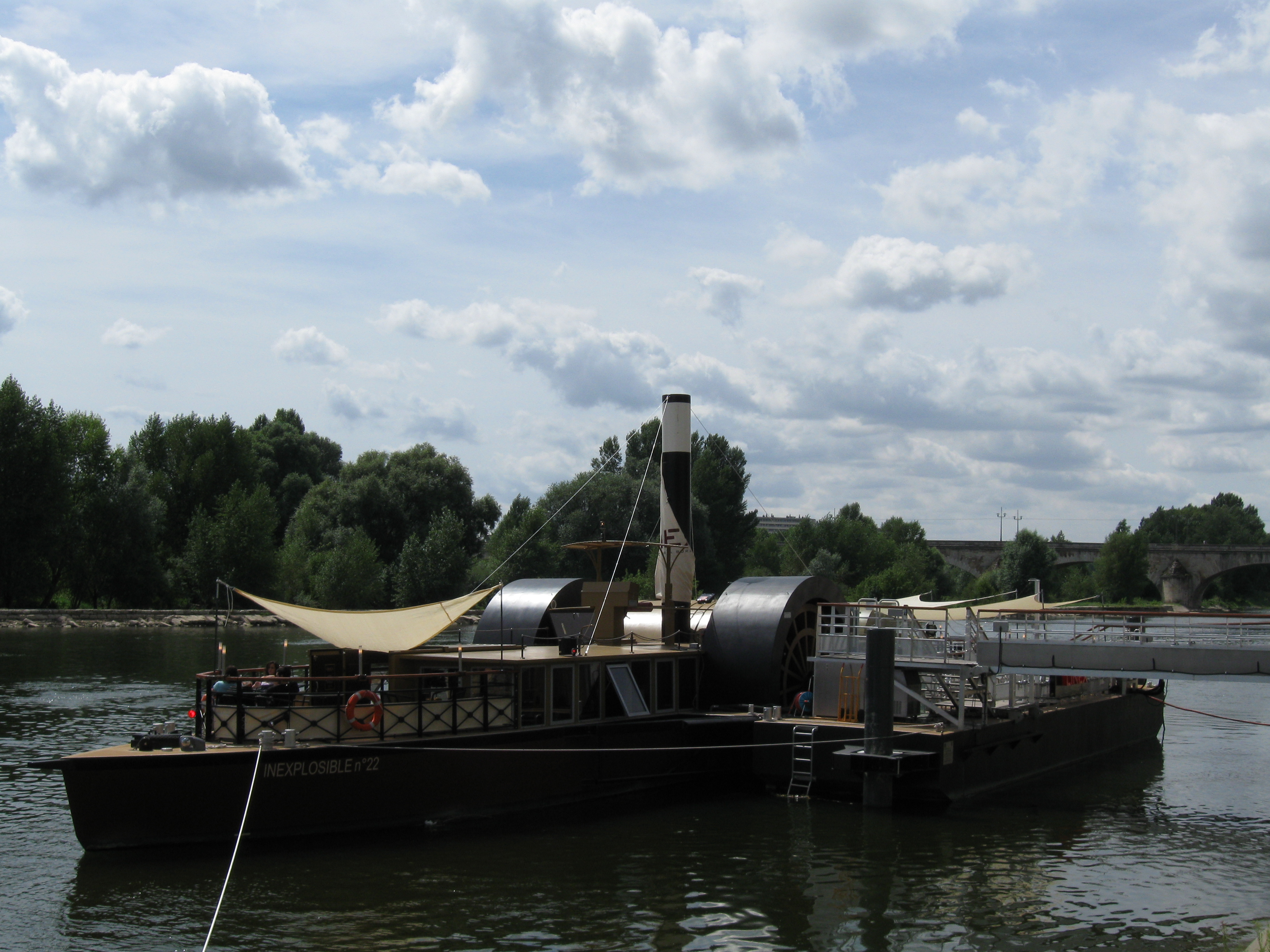 L'Inexplosible n° 22, reconstitution d'un bateau de Loire à vapeur et à aubes du XIXème siècle, Orléans, Loiret, France